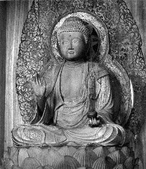 原画は西国薬師巡礼（井上博道）より転載。モノクロ処理をした作品。